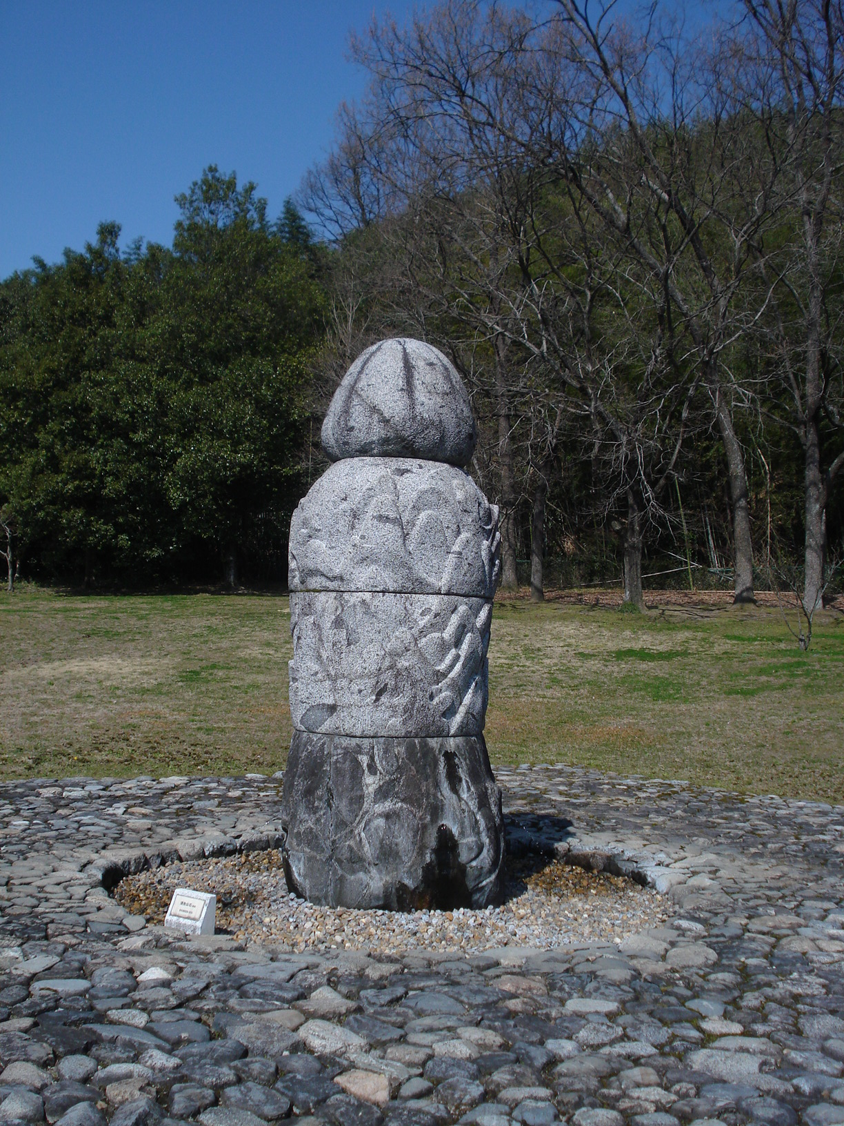 日本庭園・須弥山形式 日本国奈良県飛鳥資料館